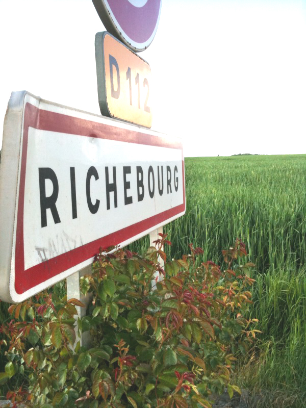 Panneau d'entrée de Richebourg (Yvelines, France)